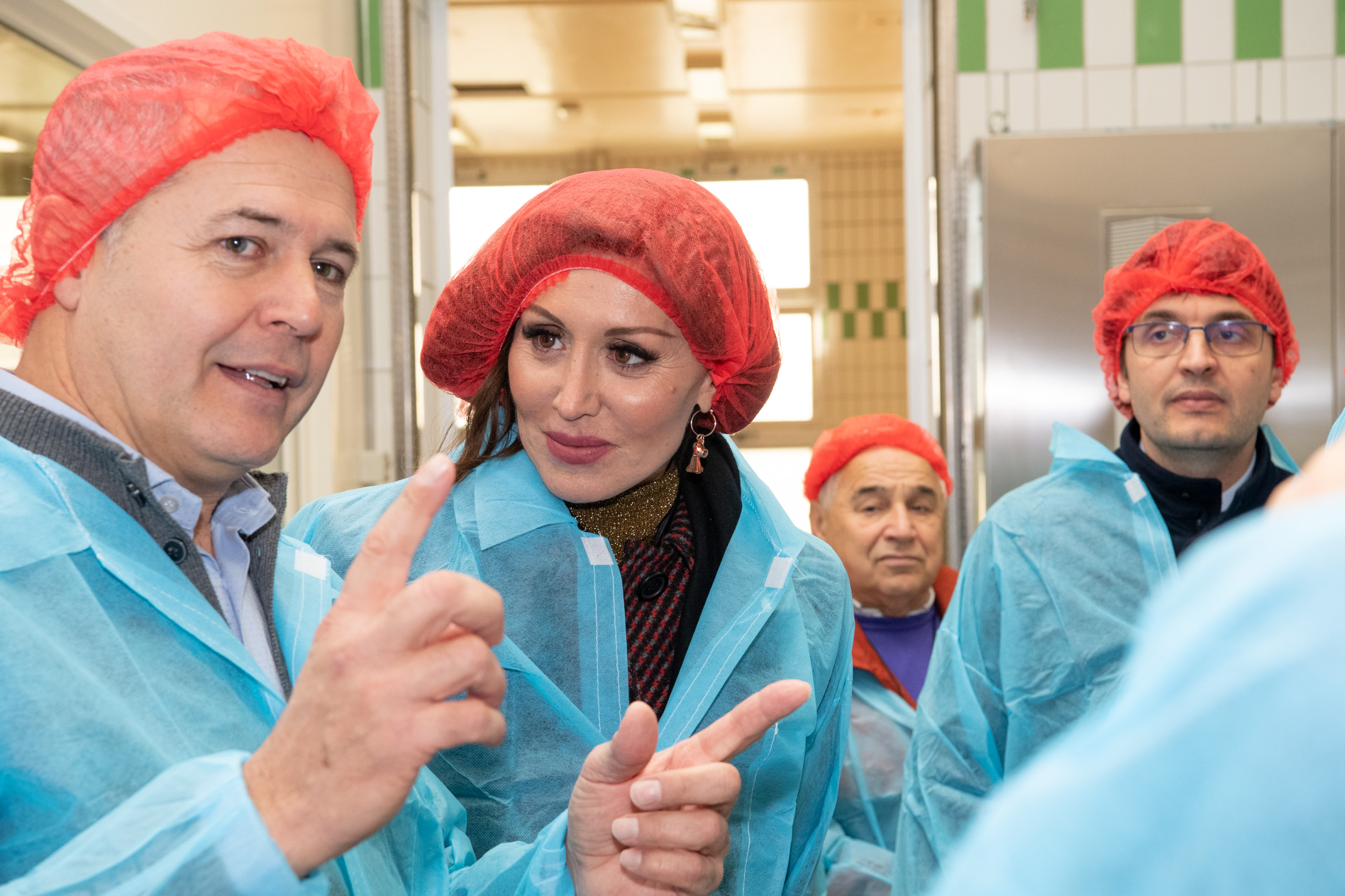 Bernini visita impresa caseificio Sant'Anna (BO)